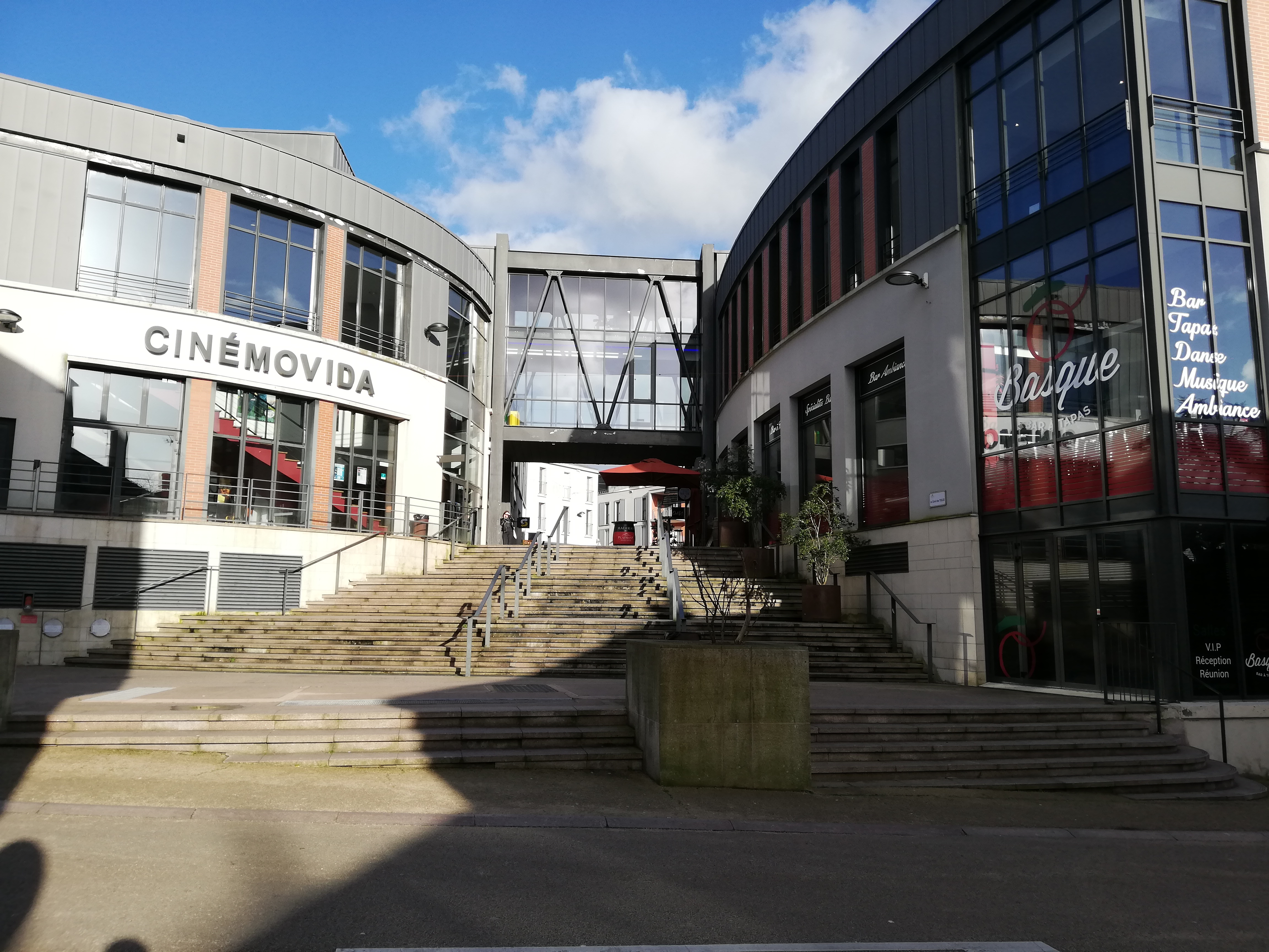 Arcade rougé